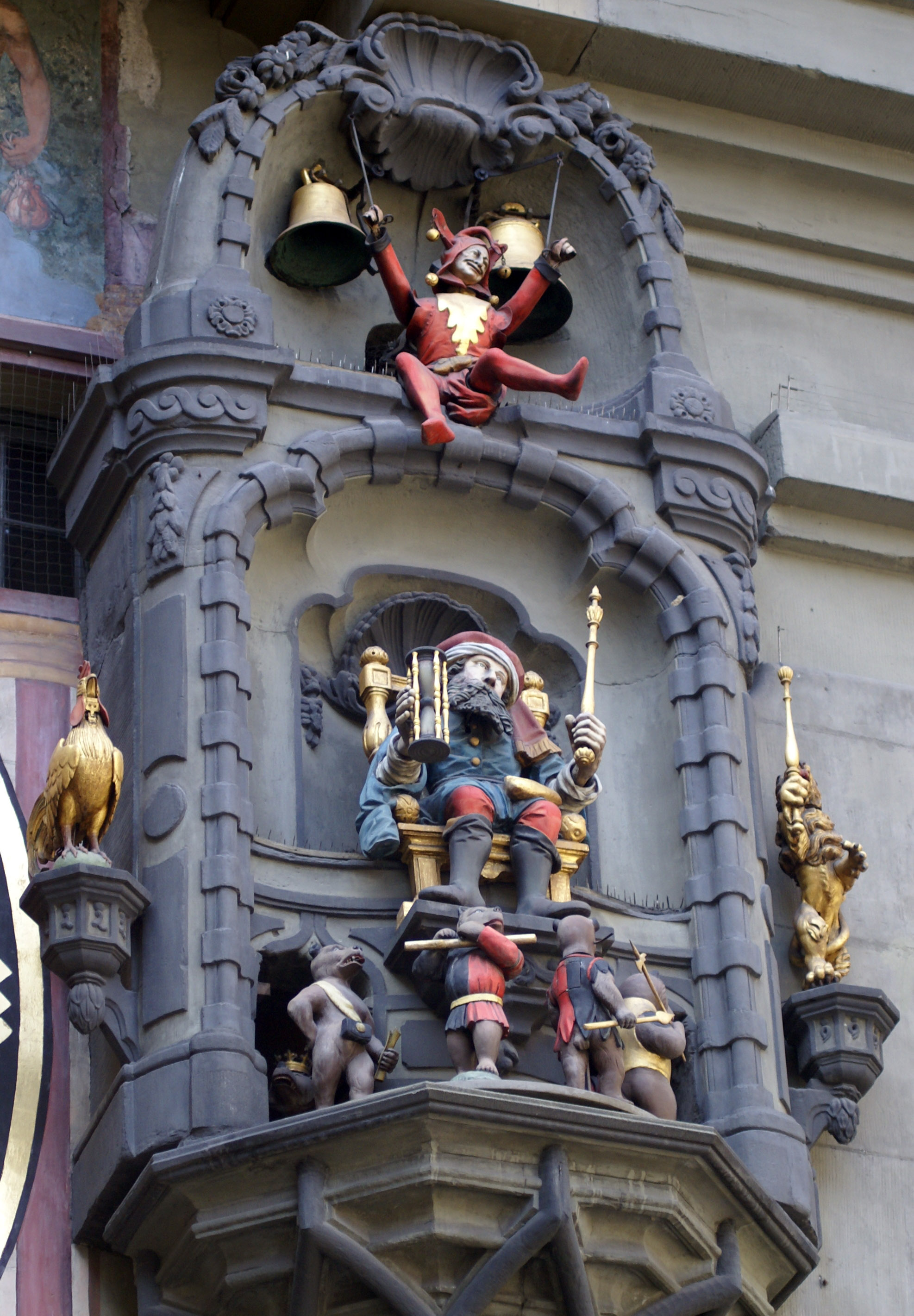 Zytglogge tower in Bern, Switzerland. Musical mechanism.